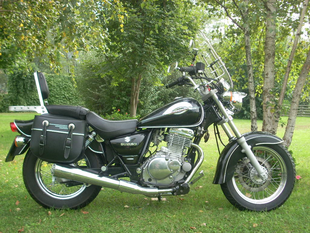 Una Suzuki GZ 250 Marauder